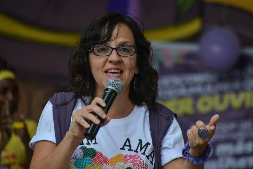 Silmara Conchão; Parada Lilás; feminismo; Dia Internacional da Mulher